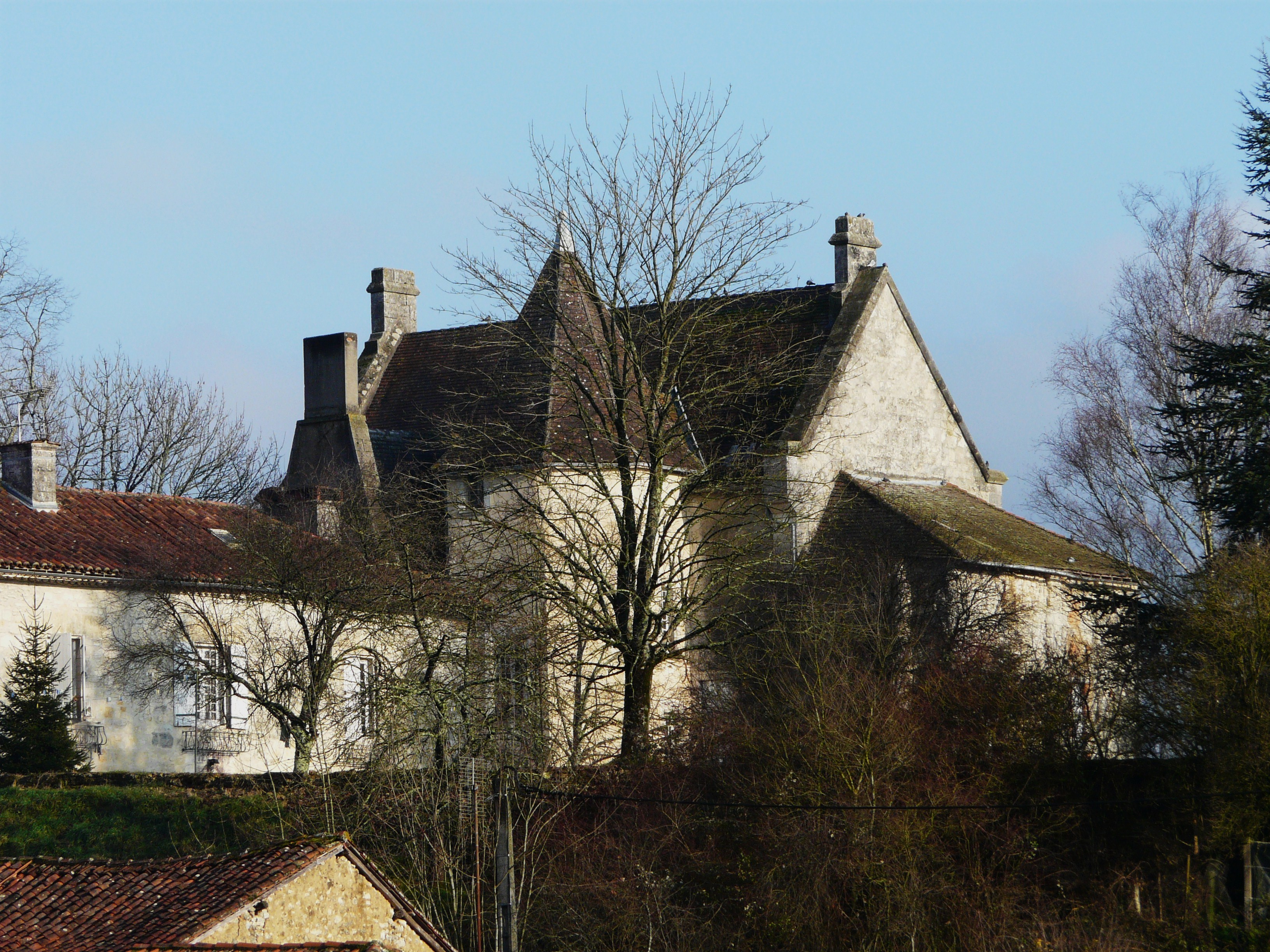 Le château d'Agonac vu depuis l'ouest, Dordogne, France Object location45° 17′ 33.5″ N, 0° 45′ 01.5″ E